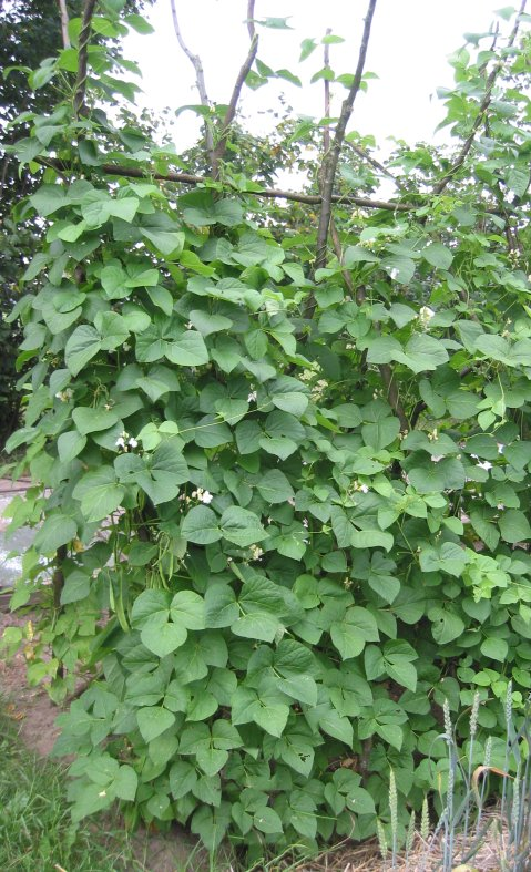 zelfgemaakte foto van pronkboon aan bonenstokken; begin augustus